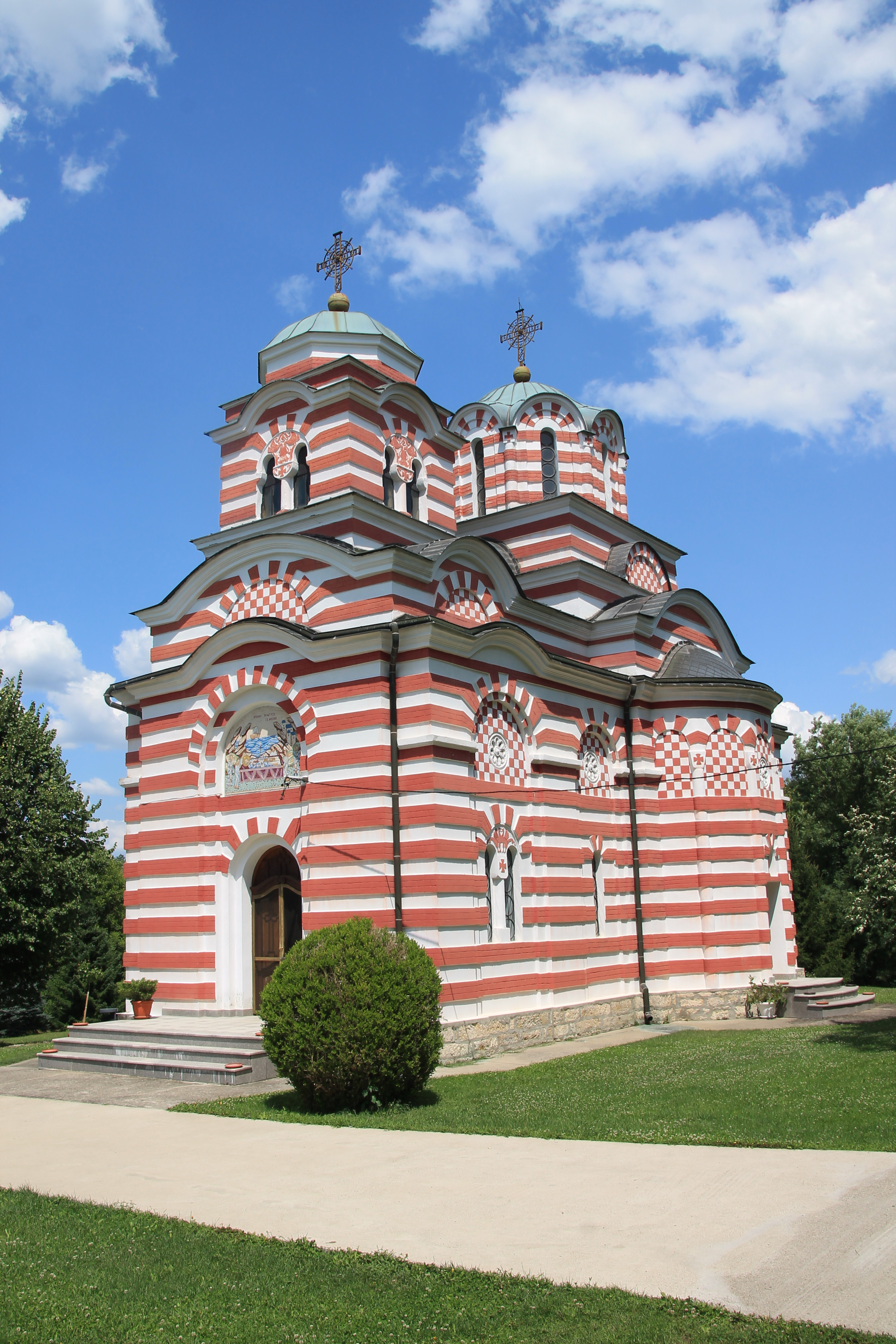 Crkva Sv. Nikole (Sibnica)